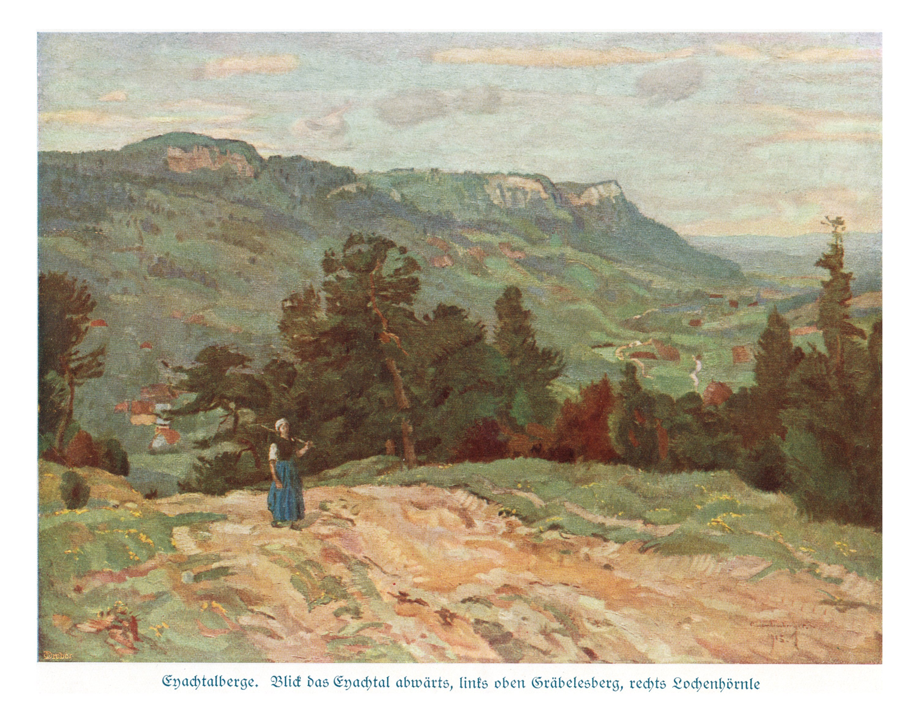 Eyachtalberge. Blick das Eyachtal abwärts, links oben Gräbelesberg, rechts Lochenhörnle. Gemälde von Professor Christian Landenberger in Stuttgart.